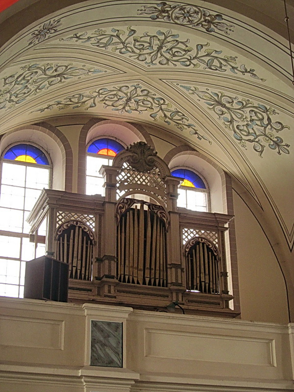 Лаздуны 1. Касцёл Святых Сымона і Тадэвуша